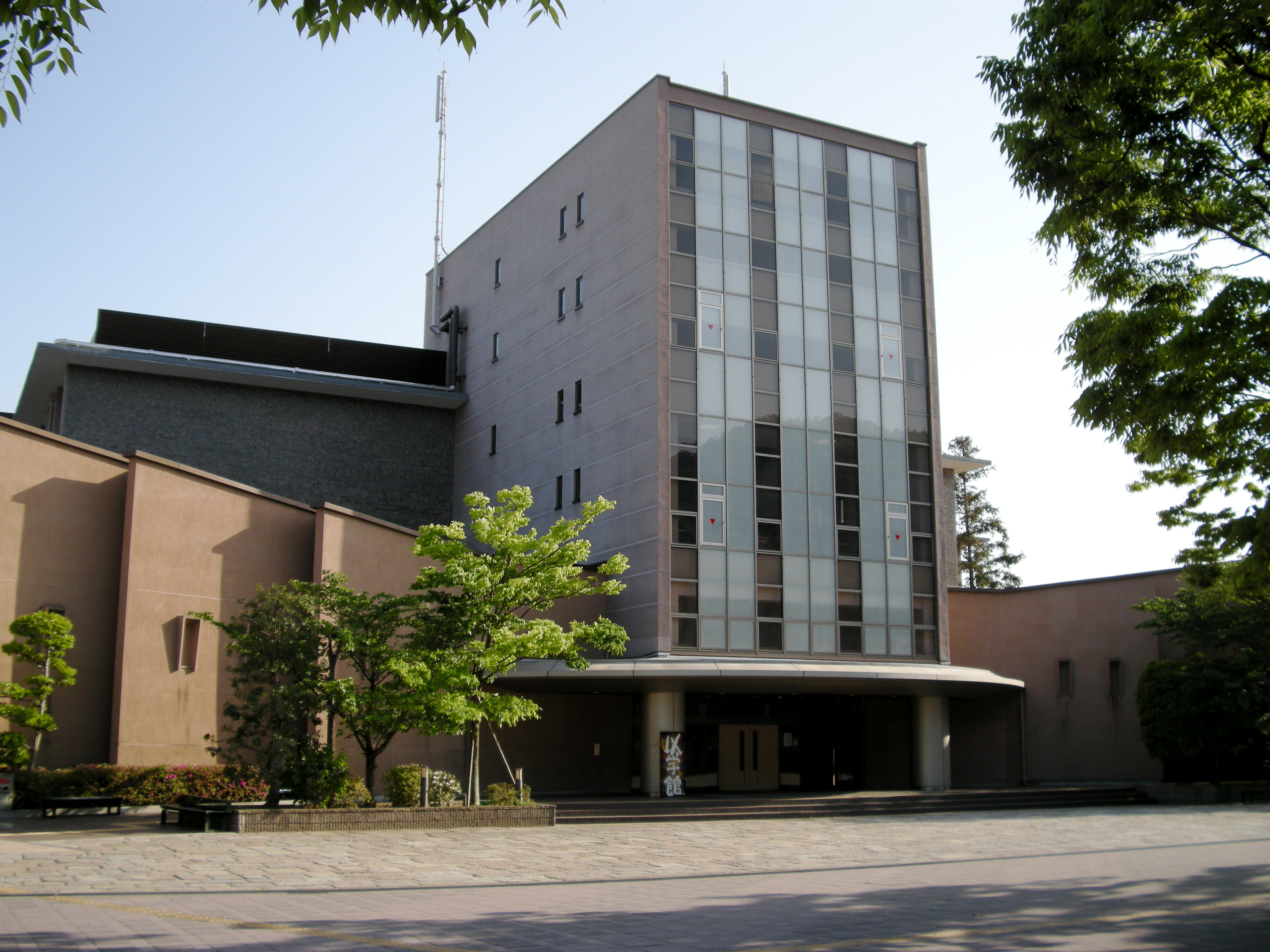 Igakukan Hall (Kinugasa Campus, Ritsumeikan University, Kyoto, Japan)